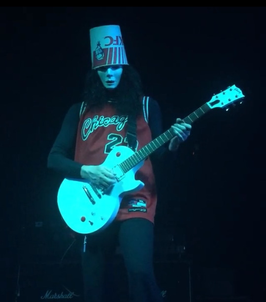 Buckethead en su primer show después de 4 años (The Granada Theatre, 15 Abril, 2016)